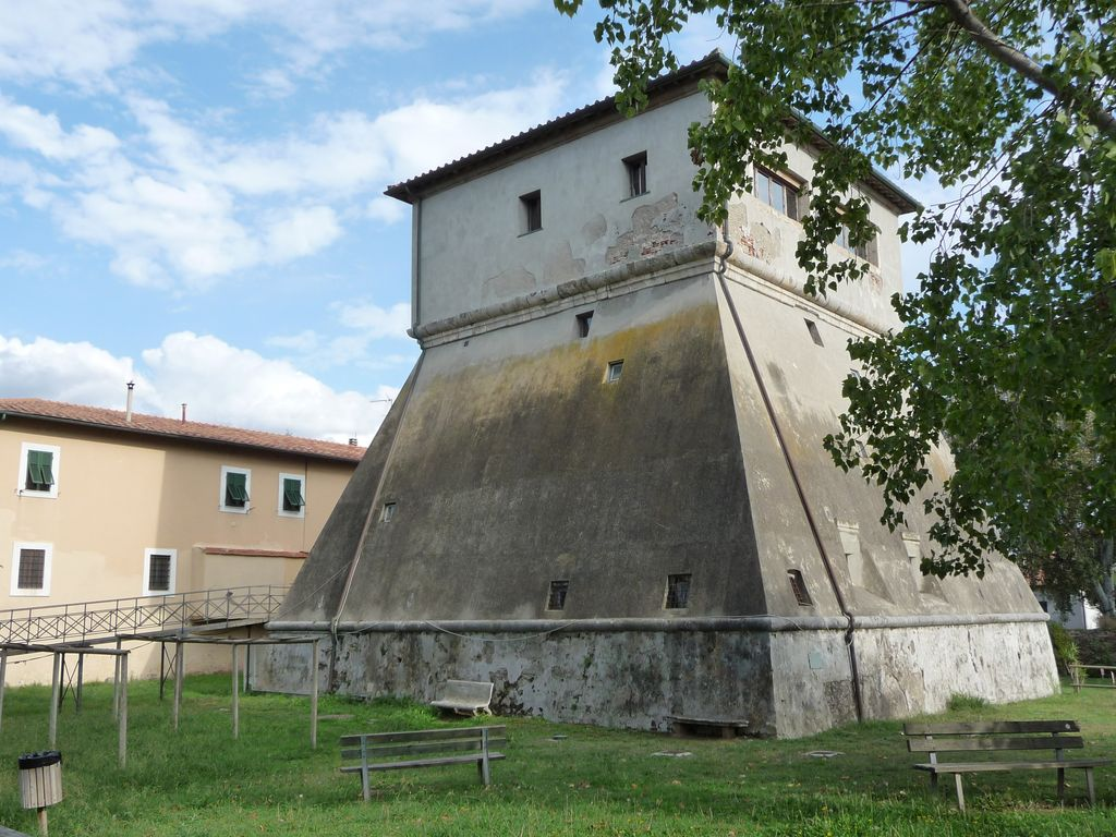 Vada, frazione di Rosignano Marittimo (Livorno) - Il vecchio faro (Marina Militare)